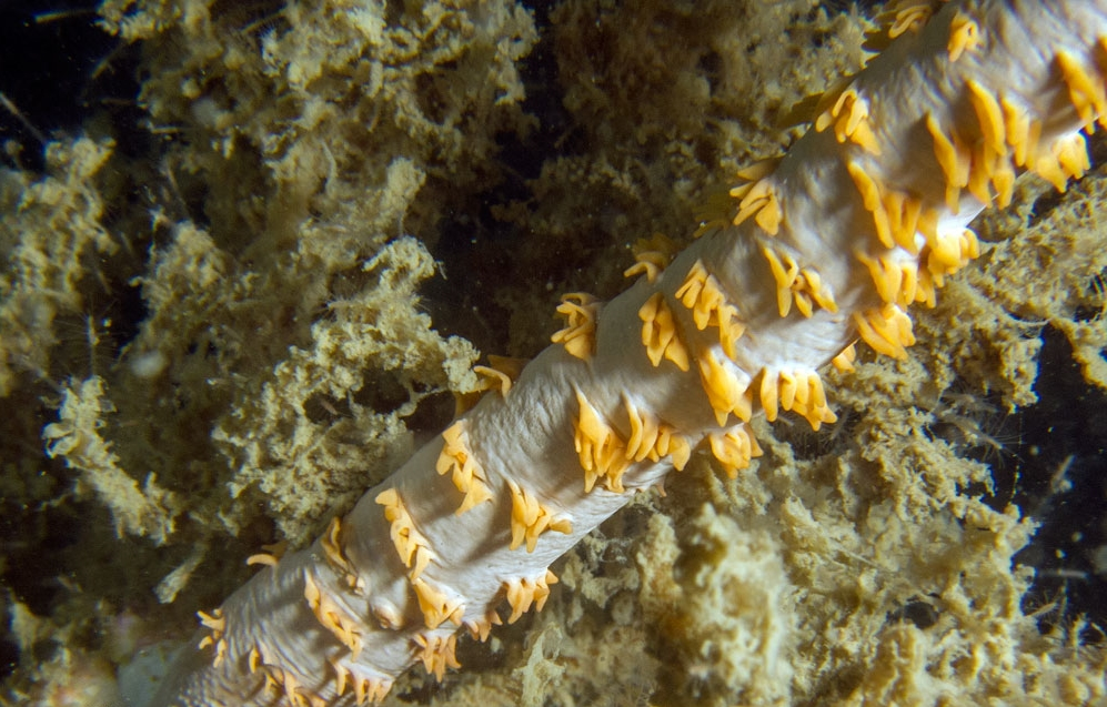 Junceella fragilis con pólipos parcialmente retraídos, asomando las puntas de sus tentáculos. Koh Phangan, Tailandia